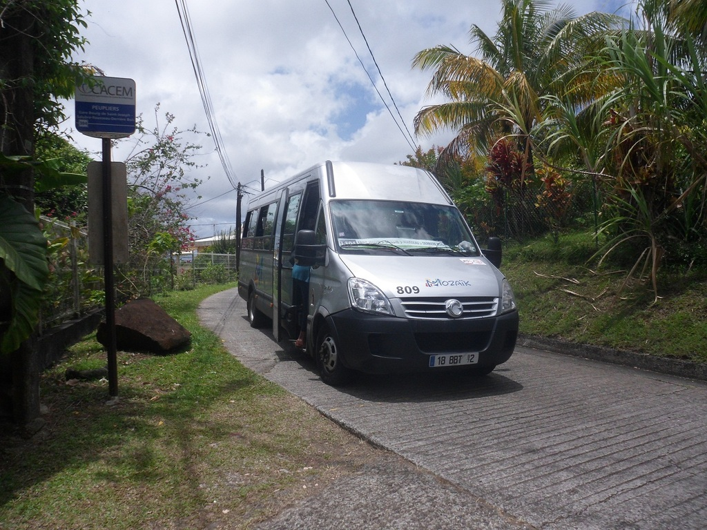 Iveco Daily sur la ligne 304 du réseau Mozaïk à Saint-Joseph, en Martinique.